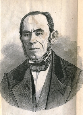 שמחה פינסקר